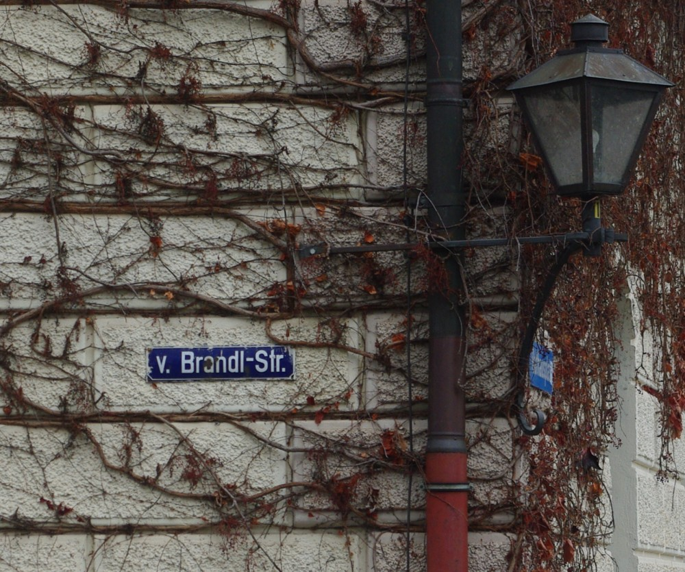 Von-Brandl-Straße in 83410 Laufen/Salzah